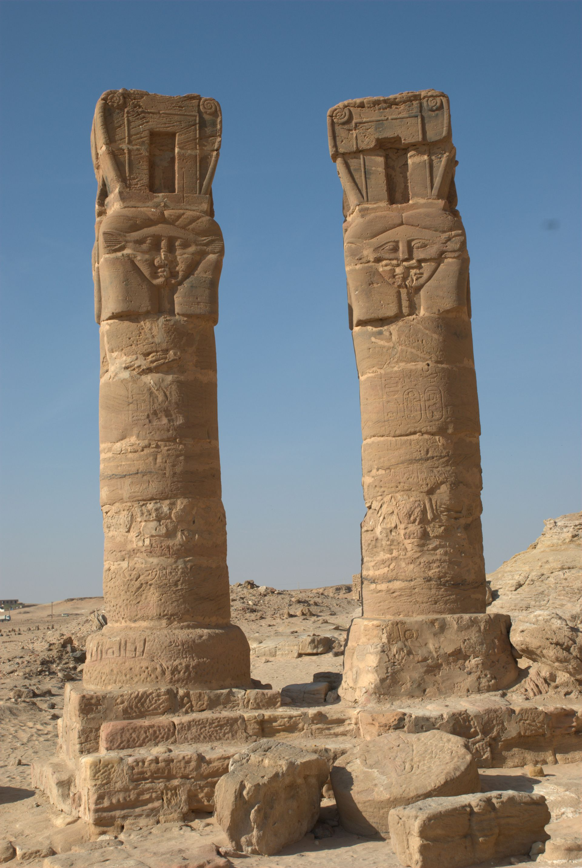 Columns B300, Temple of Mut, Jebel Barkal, Sudan